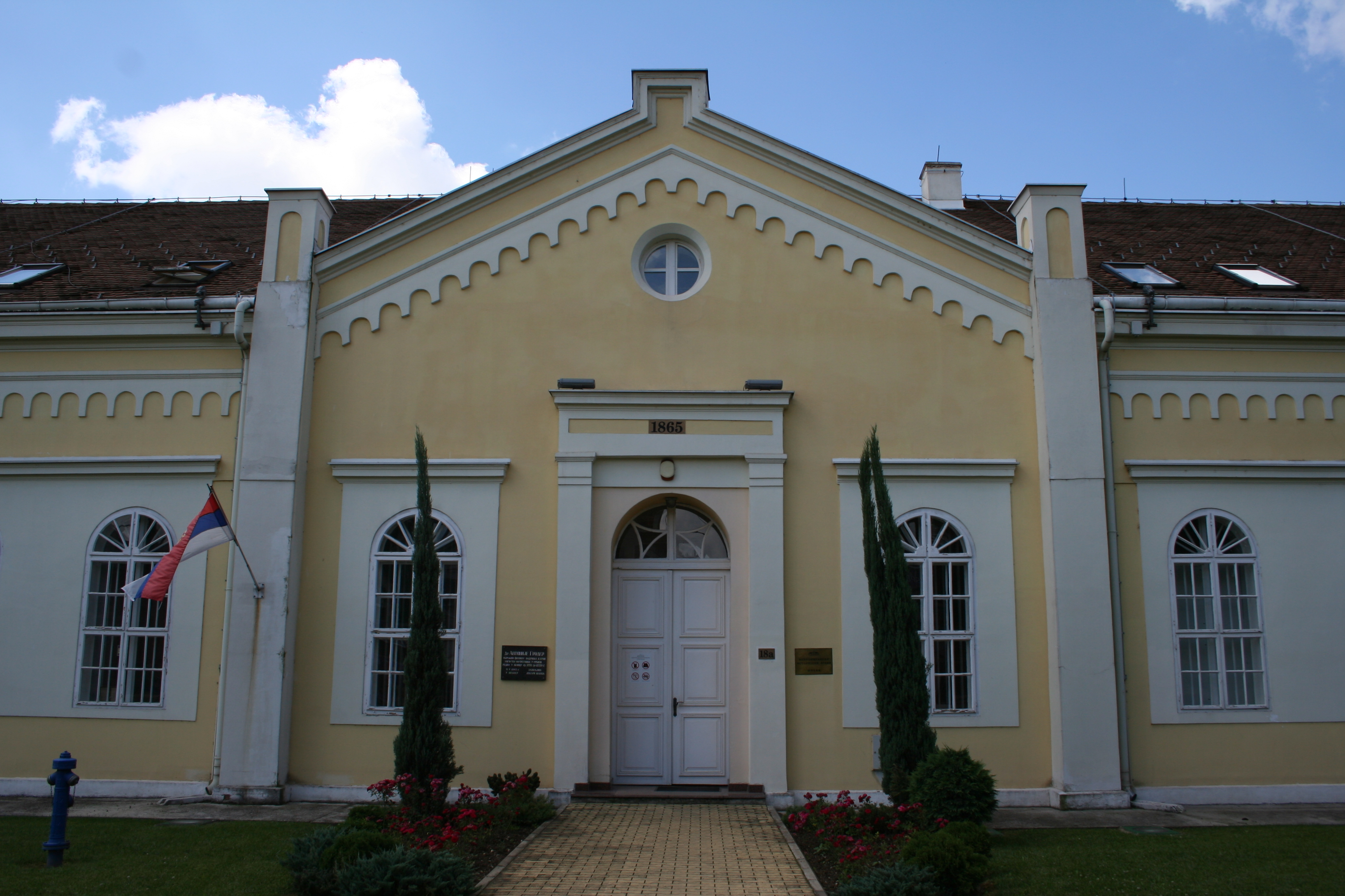 Zgrada stare bolnice (Zgrada Istorijskog arhiva)